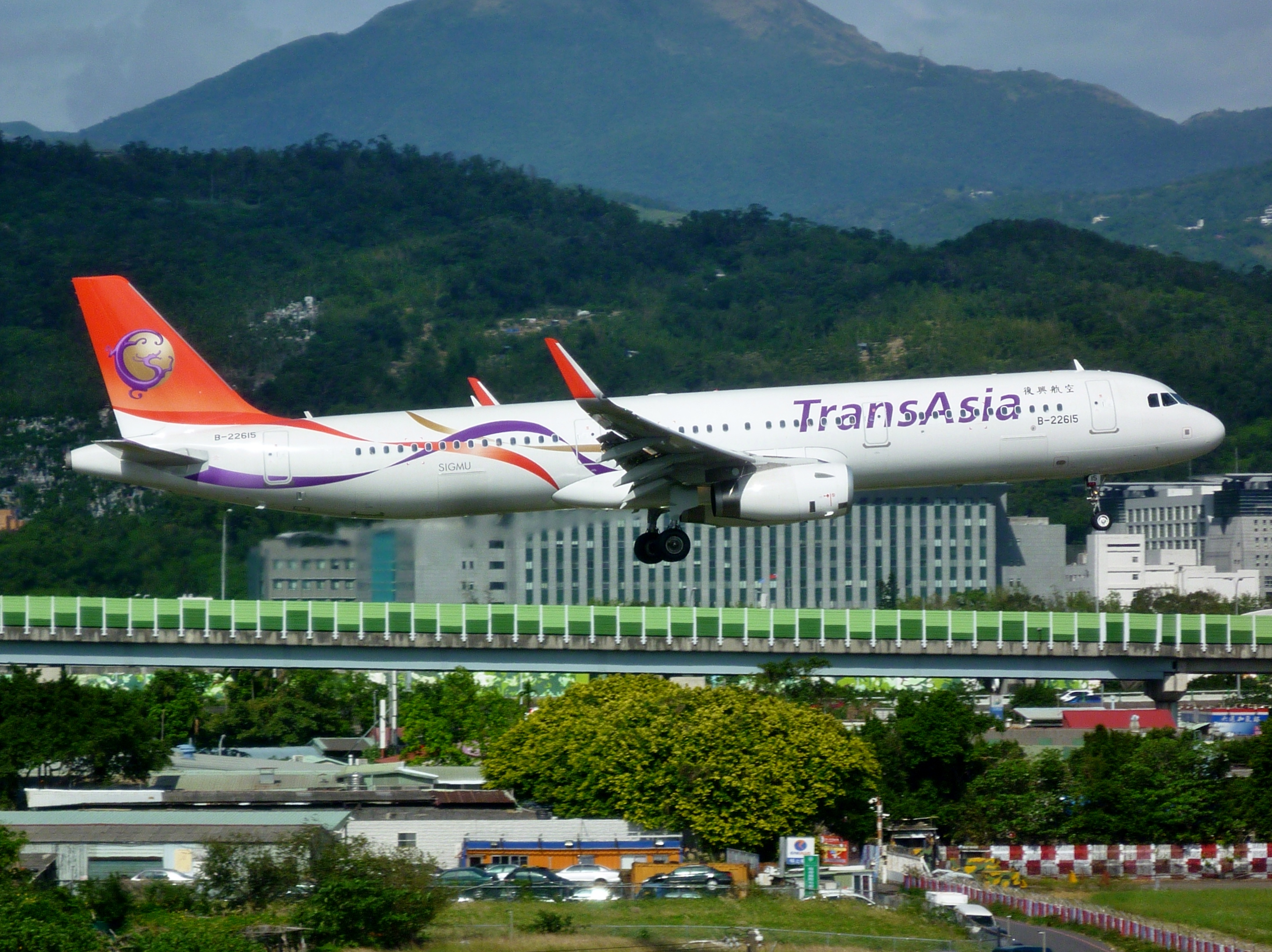 復興航空 空中巴士 A321-231(WL)型 TransAsia Airways Airbus A321-231(WL)